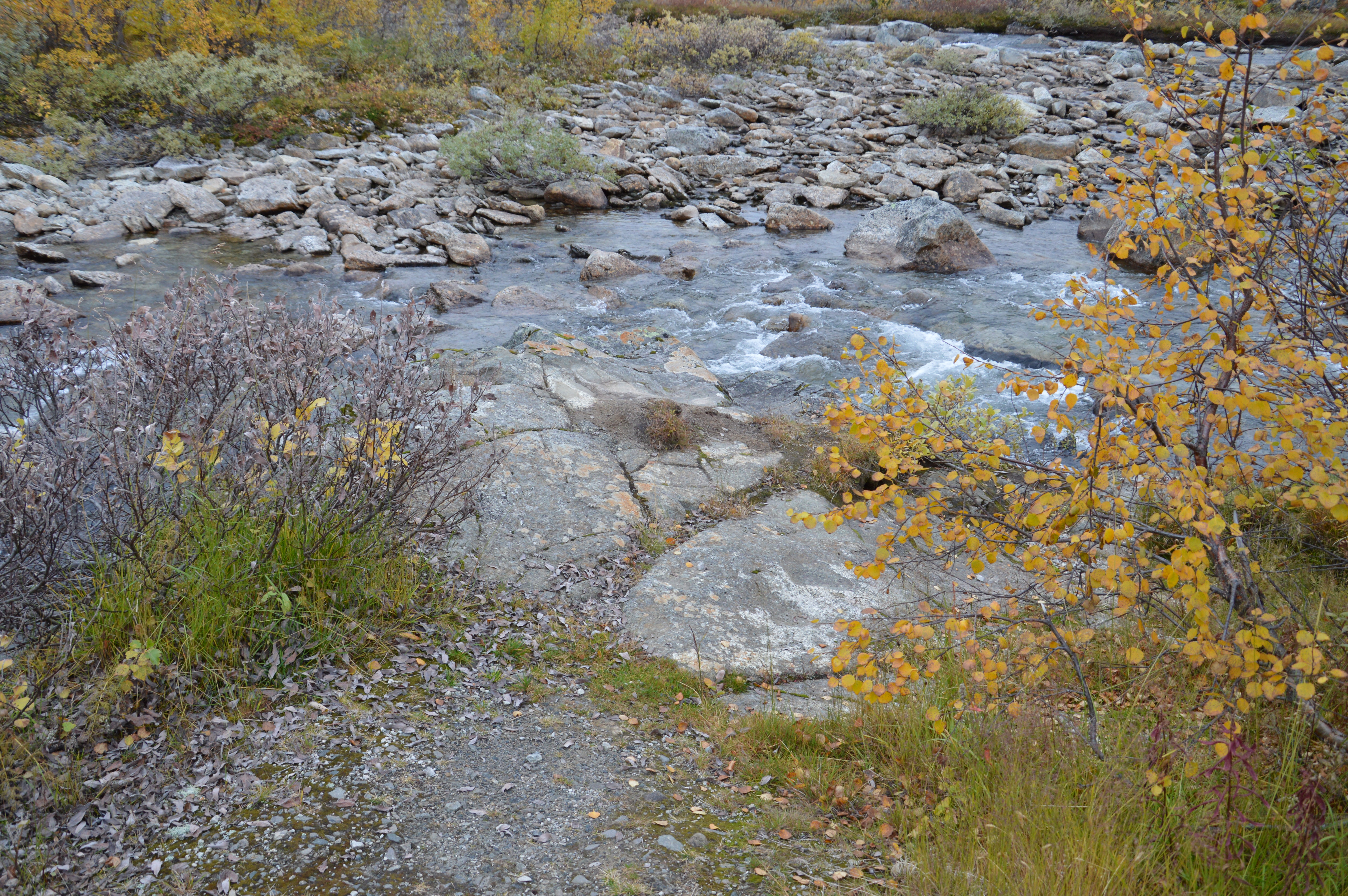 Gubbeltåga i nærheten av bomstasjonen like nord for brua i Stokkalia, den 25. september 2012